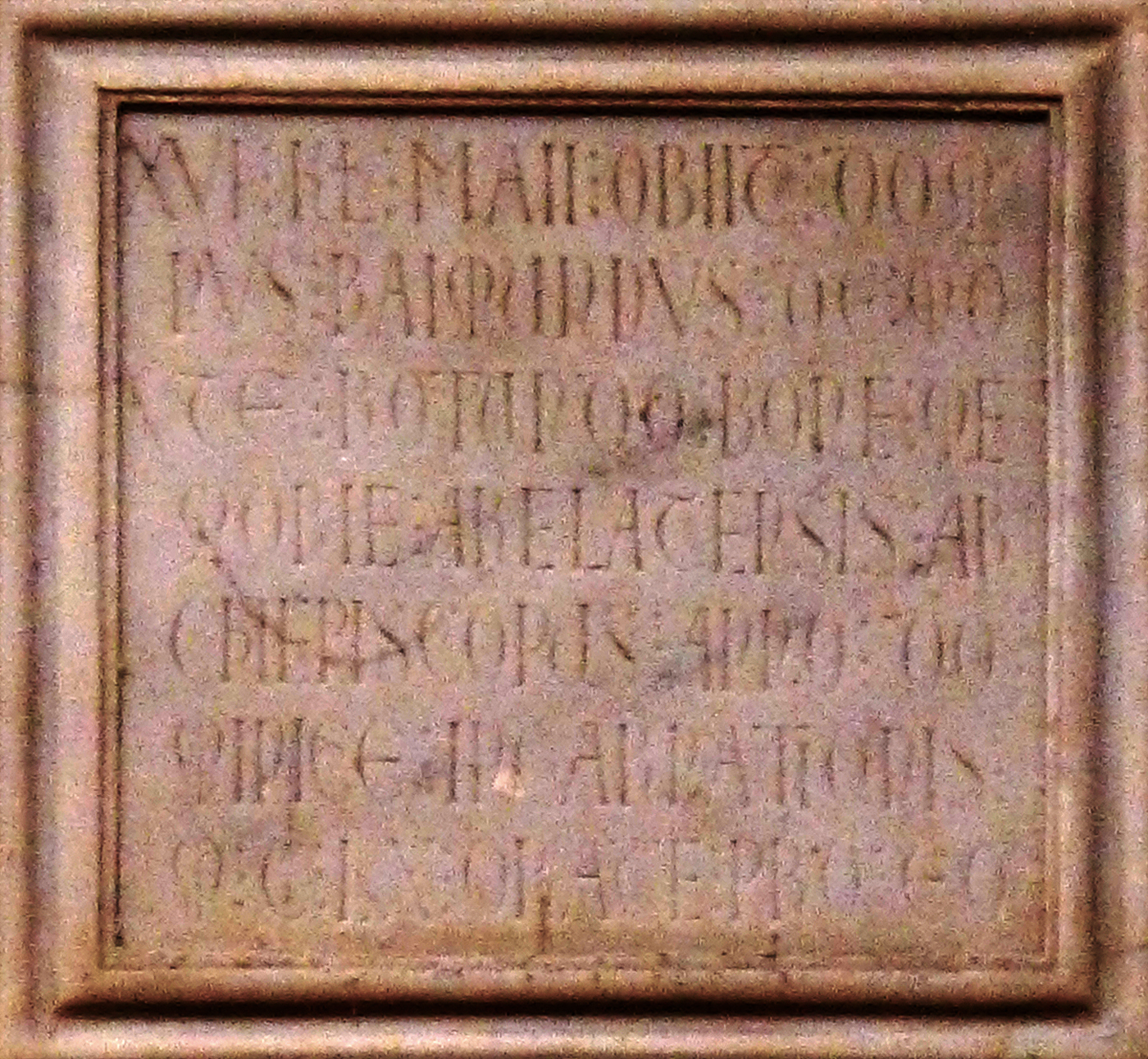 Église Saint-Trophime (épitaphe de l'archevêque Raimond de Montredon) - Arles (Bouches-du-Rhône, France)